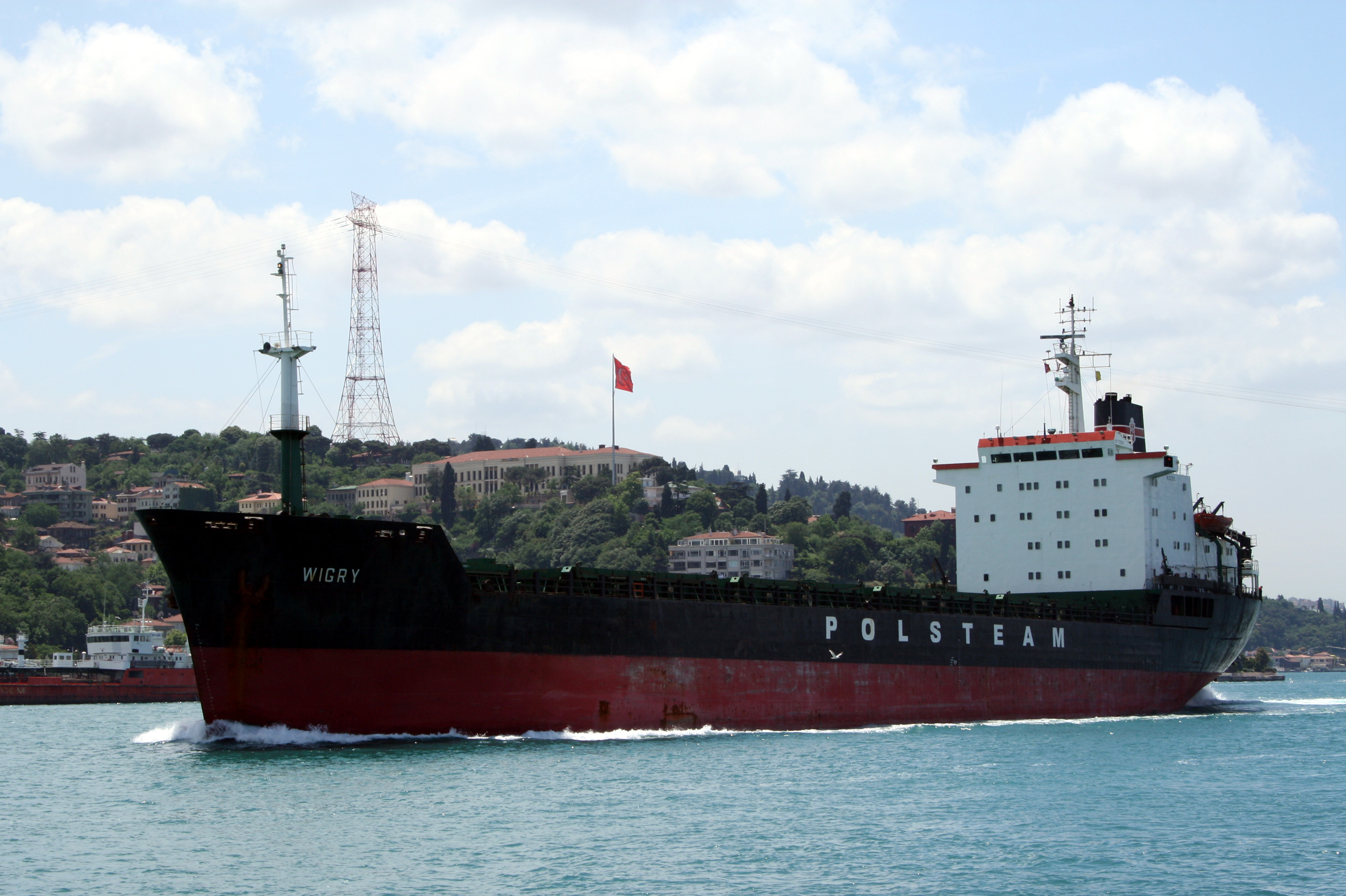 Le Wigry (IMO : 7725697) dans le Bosphore